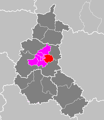 Maps of arrondissements and cantons of France: Arrondissement de Châlons-en-Champagne - Canton de Marson.PNG